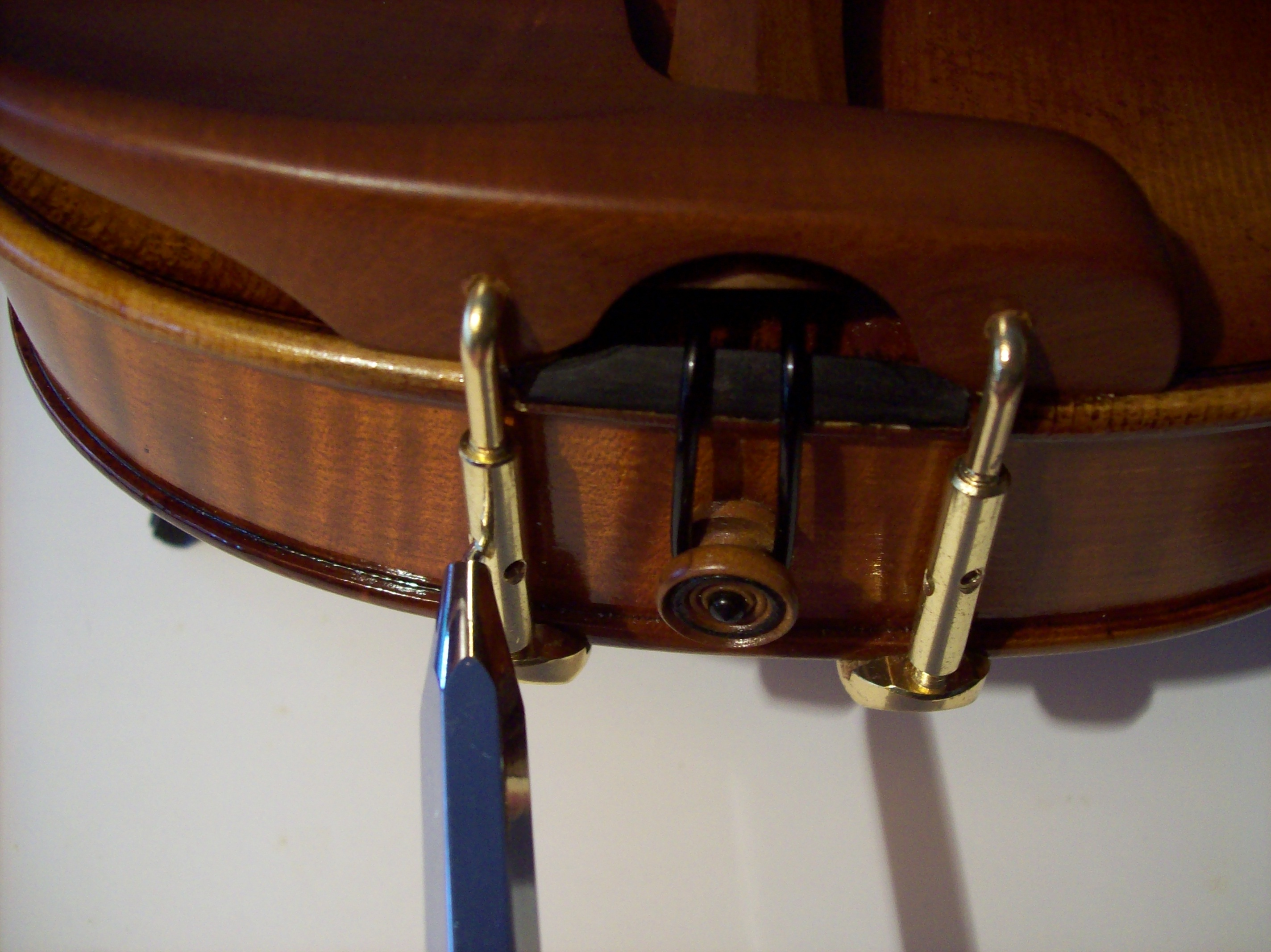 Kinnhalterschlüssel an der Schloßschraube